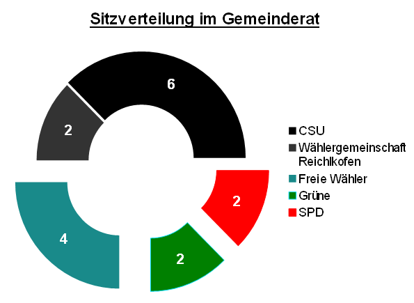 Sitzverteilung im Gemeinderat Adlkofen nach Kommunalwahl 2014